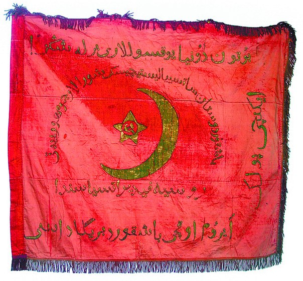 Знамя Башкирской отдельной стрелковой бригады.